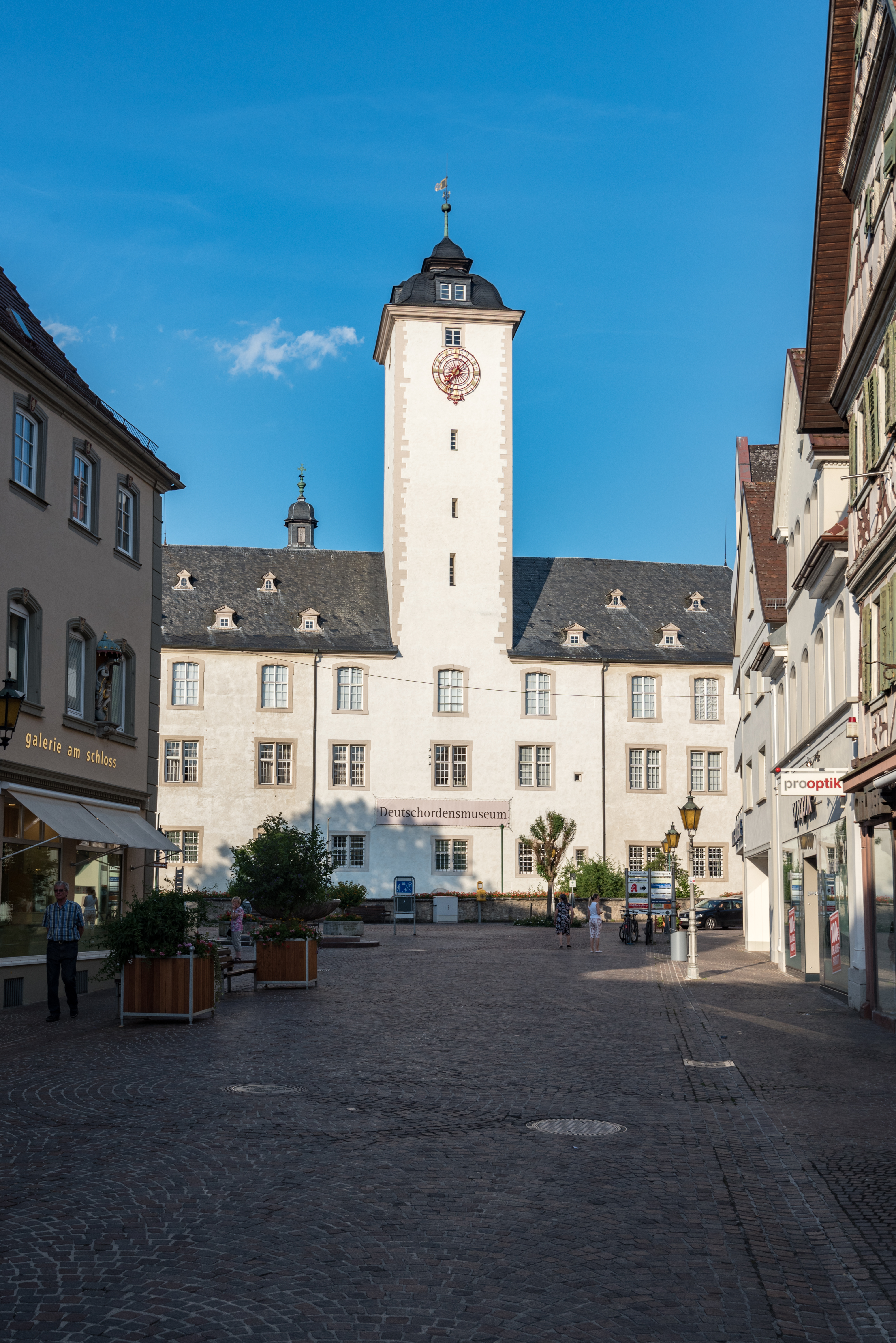 Bad Mergentheim, Deutschordensschloß von Westen